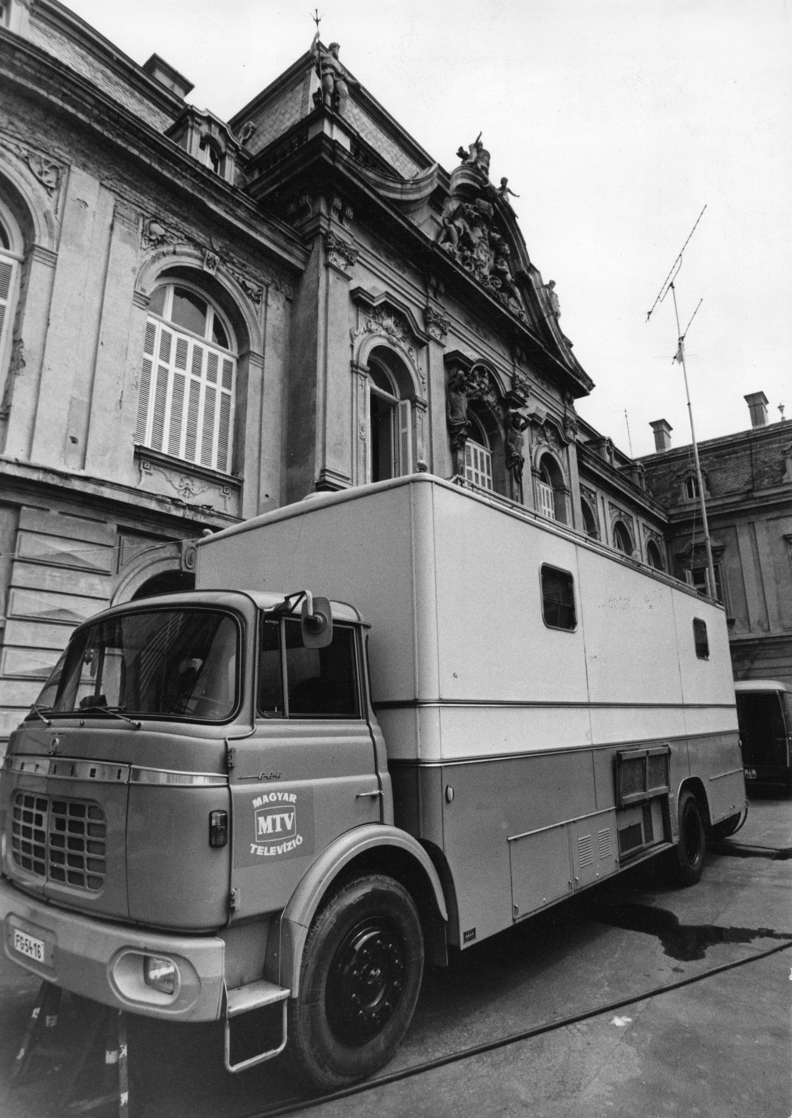 Festetics-kastély. Az MTV színes közvetítőkocsija az Interfórum hangverseny felvételekor. Location: Hungary Tags: commercial vehicle, number plate, Berliet-brand, French brand, broadcast van, Hungarian TV, castle Title: Festetics-kastély. Az MTV színes közvetítőkocsija az Interfórum hangverseny felvételekor.